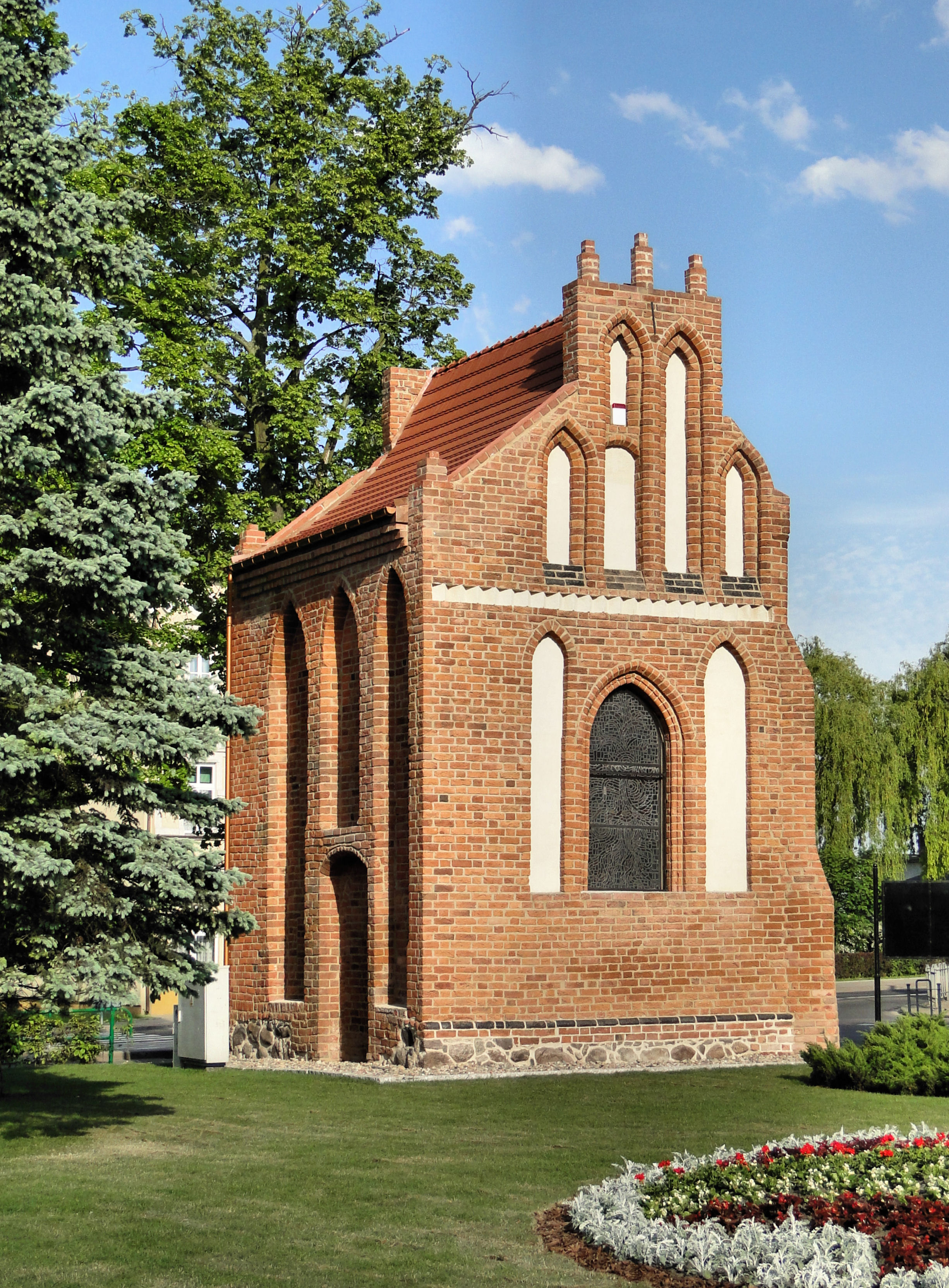 Kaplica gotycka w Policach - elewacja szczytowa zachodnia